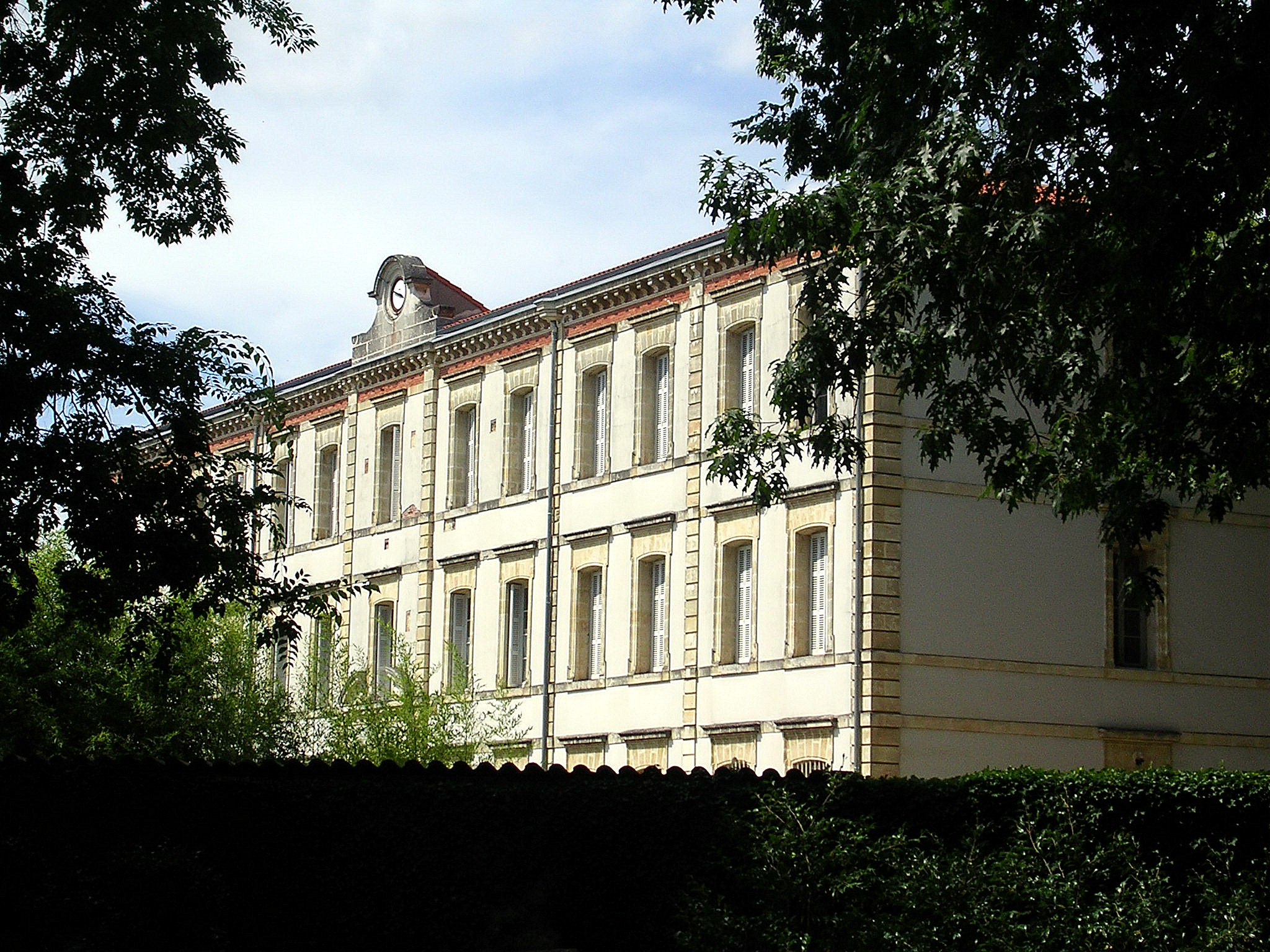 Lycée Victor Duruy, à Mont-de-Marsan. Photo prise par Jibi44